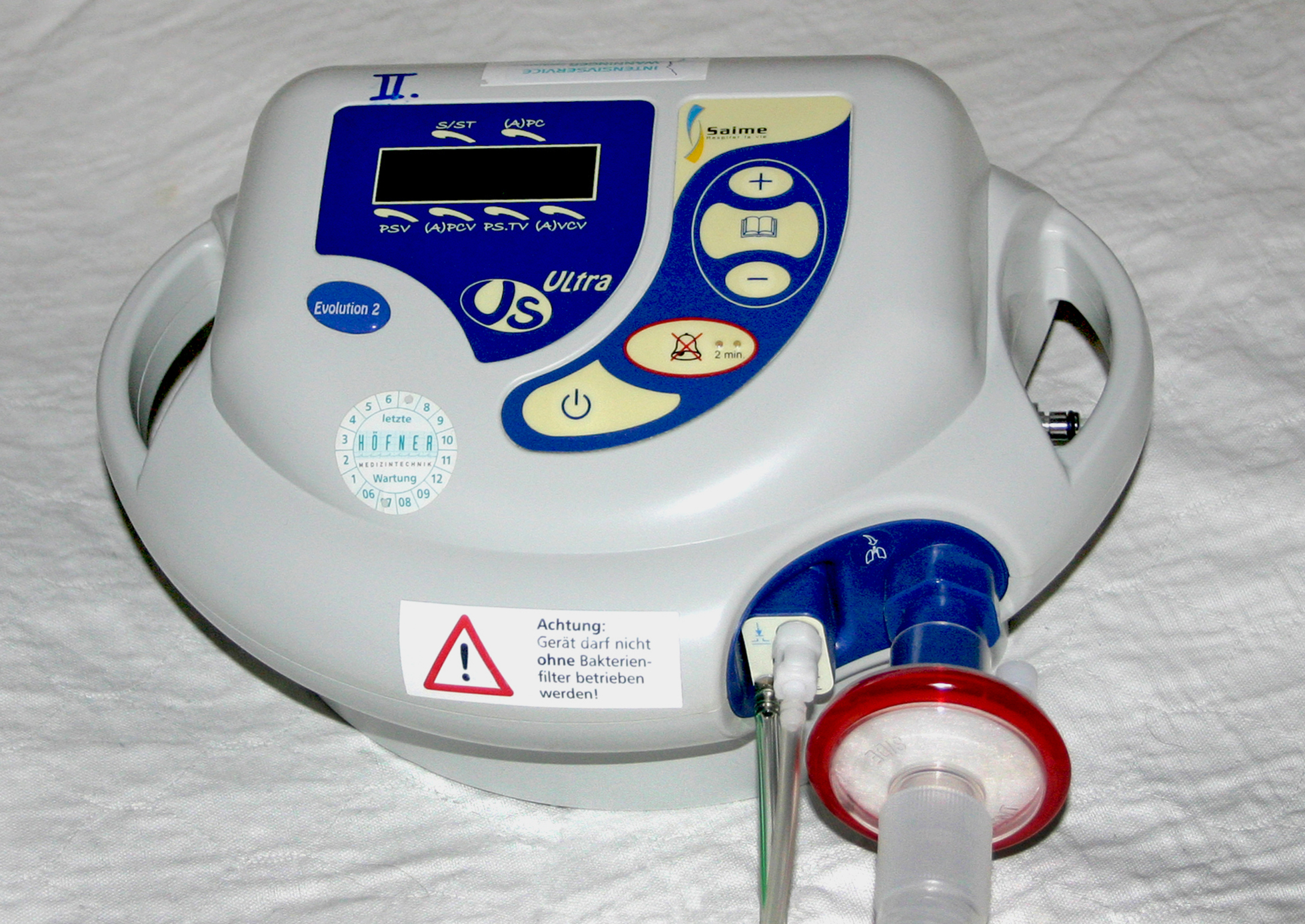 VS Ultra Heimbeatmungsgerät von Saime, Einschlauchsystem mit Expirationsventil. Die kleinen Schläuchen sind für die Patientennahe Druckmessung und für die steuerung des Expirationventils zuständig.